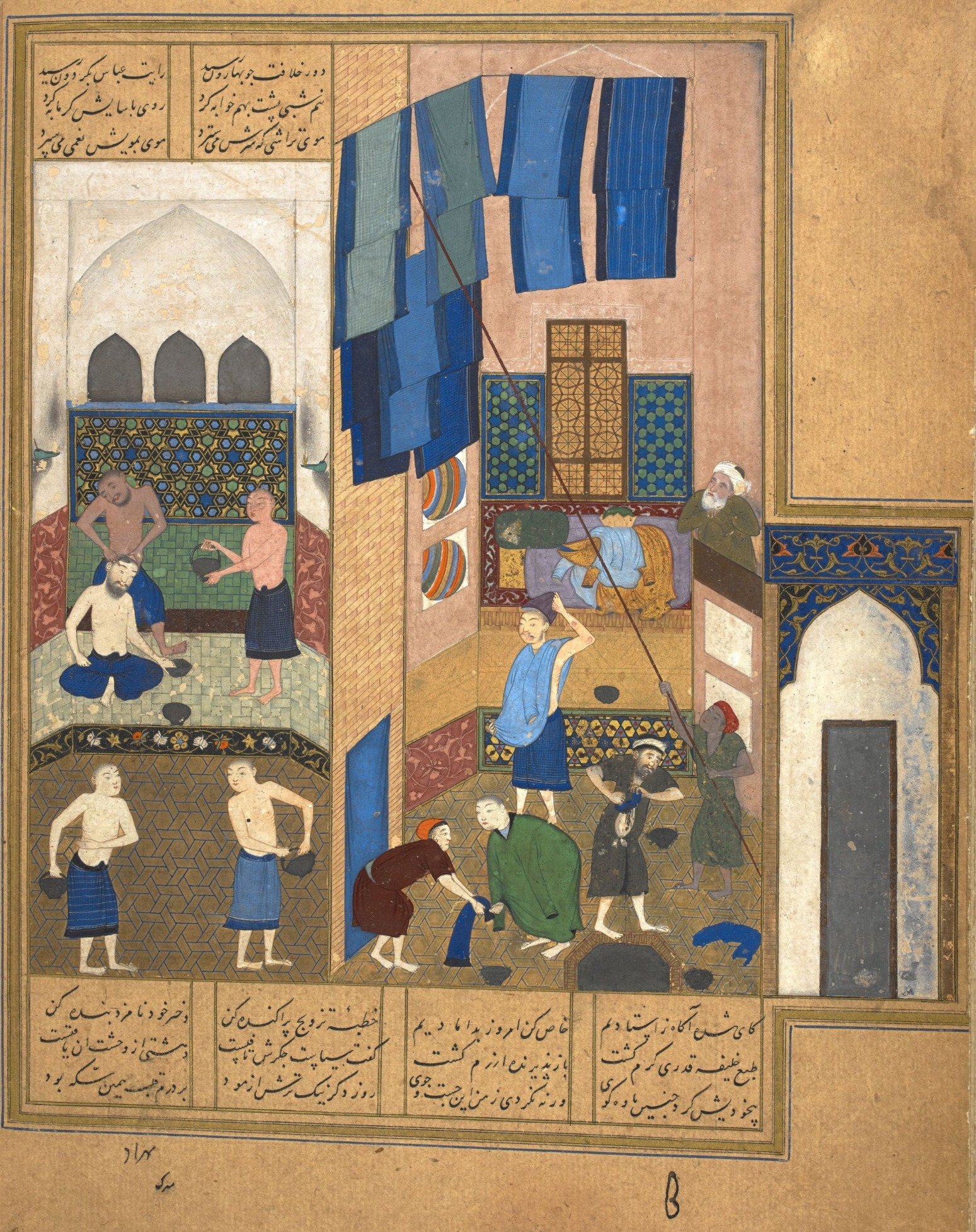 Behzad._Гарун_аль_Рашид_в_бане.